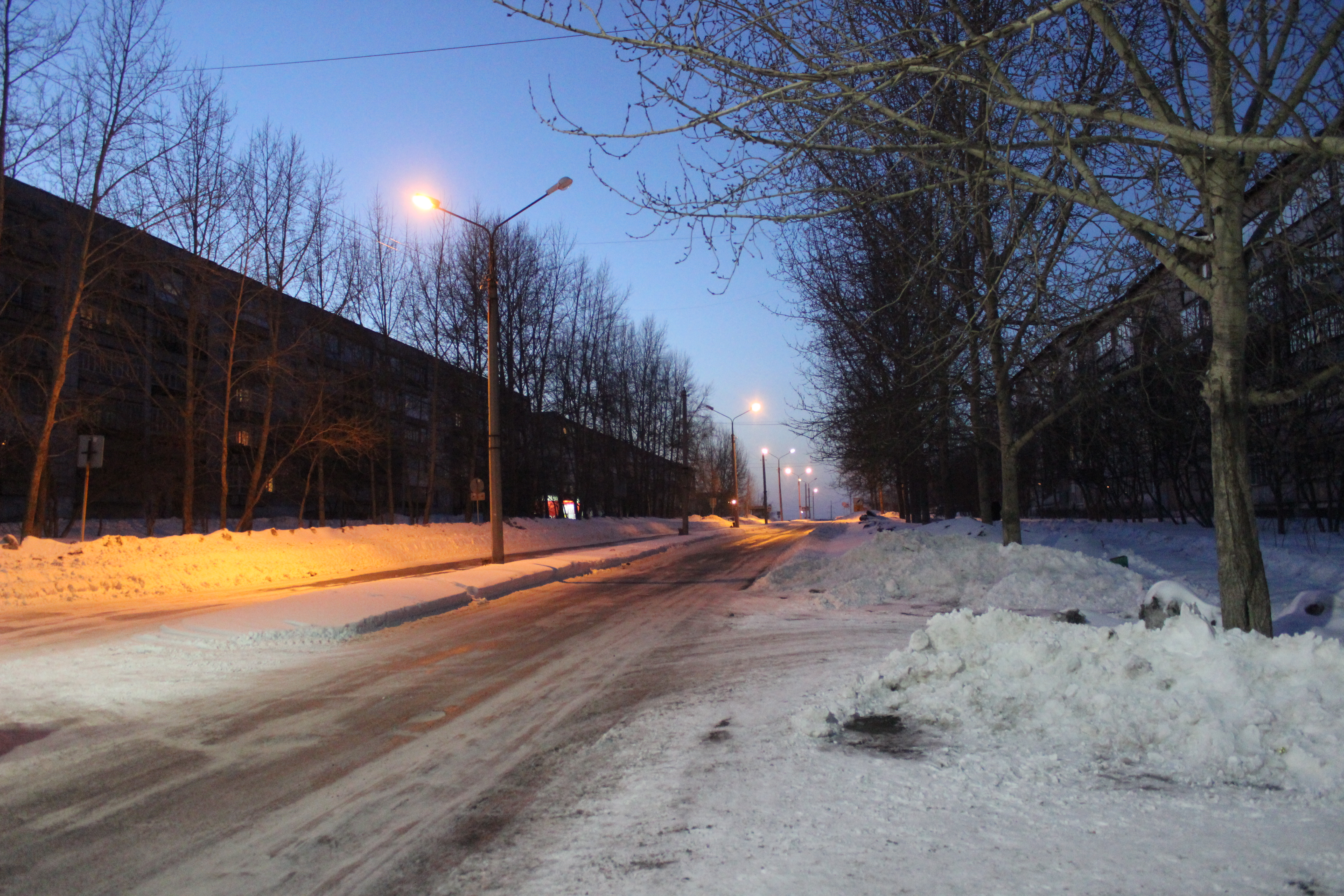 Самая широкая из улиц